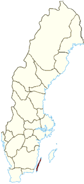 Öland, Sweden.